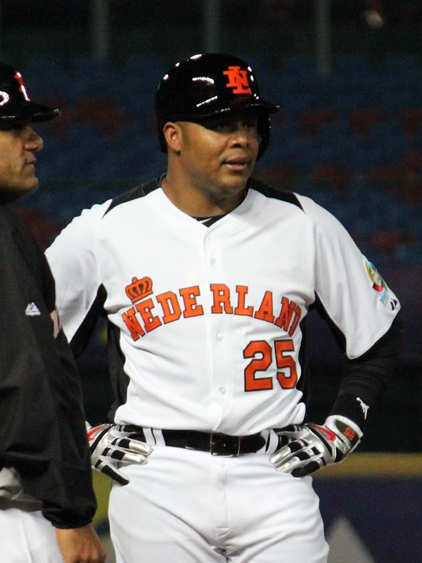 Andruw Jones